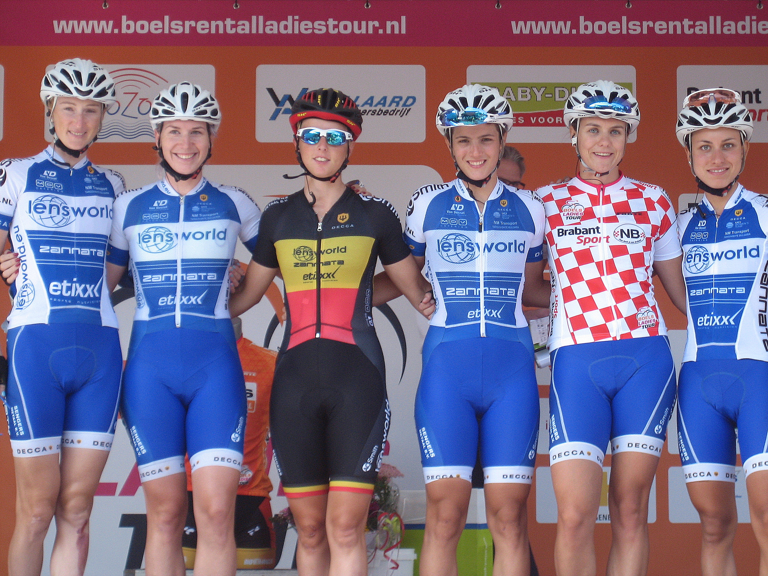 Team Lensworld-Zannata voor start 3e etappe Holland Ladies Tour 2016